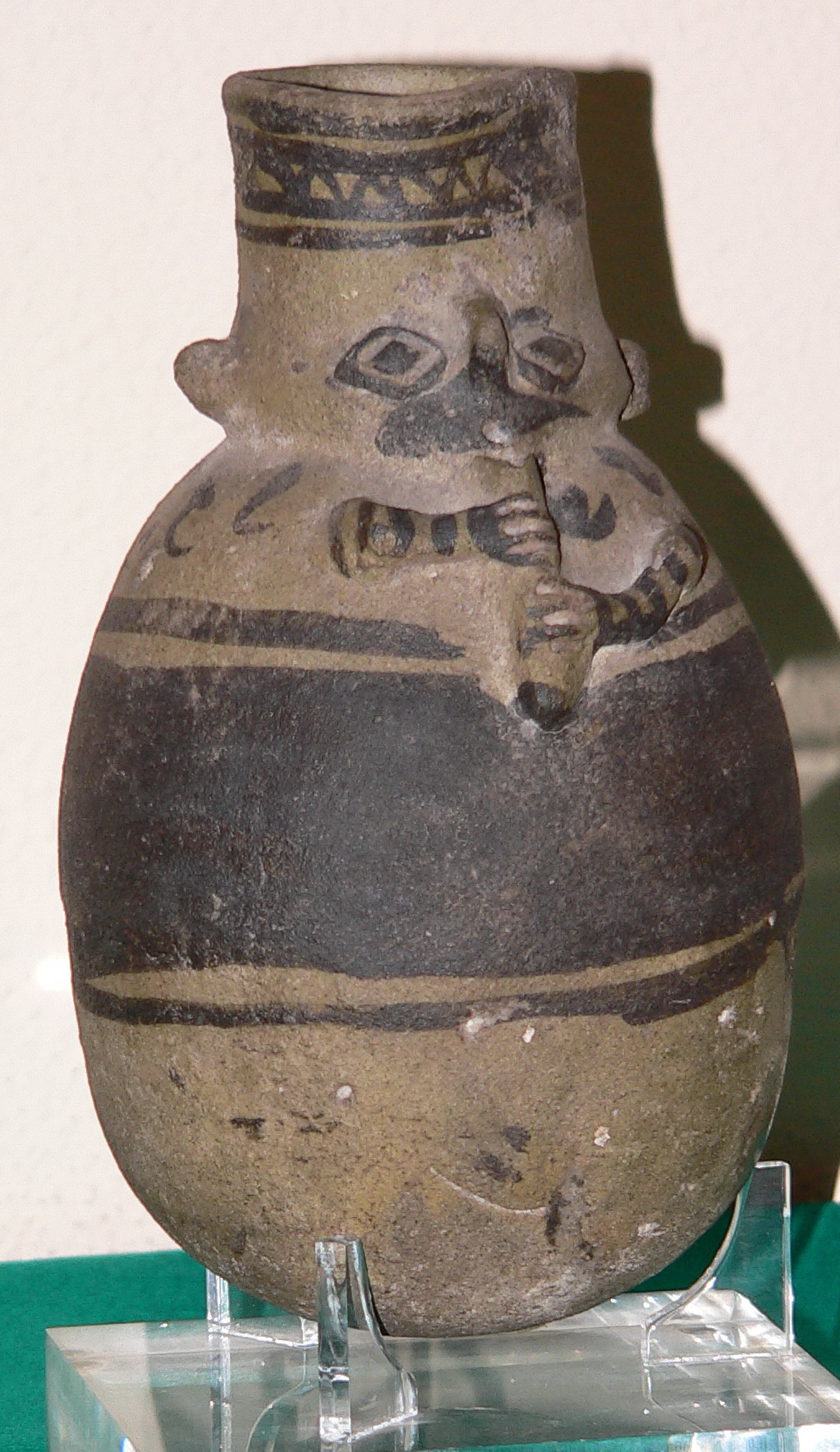 Descripción: Ceramio Antigüedad: Siglo XIII a XIV d.C Cultura: Cultura Chancay - costa centyrale del Perù - 1000-1300 d.C. País : Perú Fotógrafo: © Manuel González Olaechea y Franco Fecha de la foto : 25 de abril de 2008